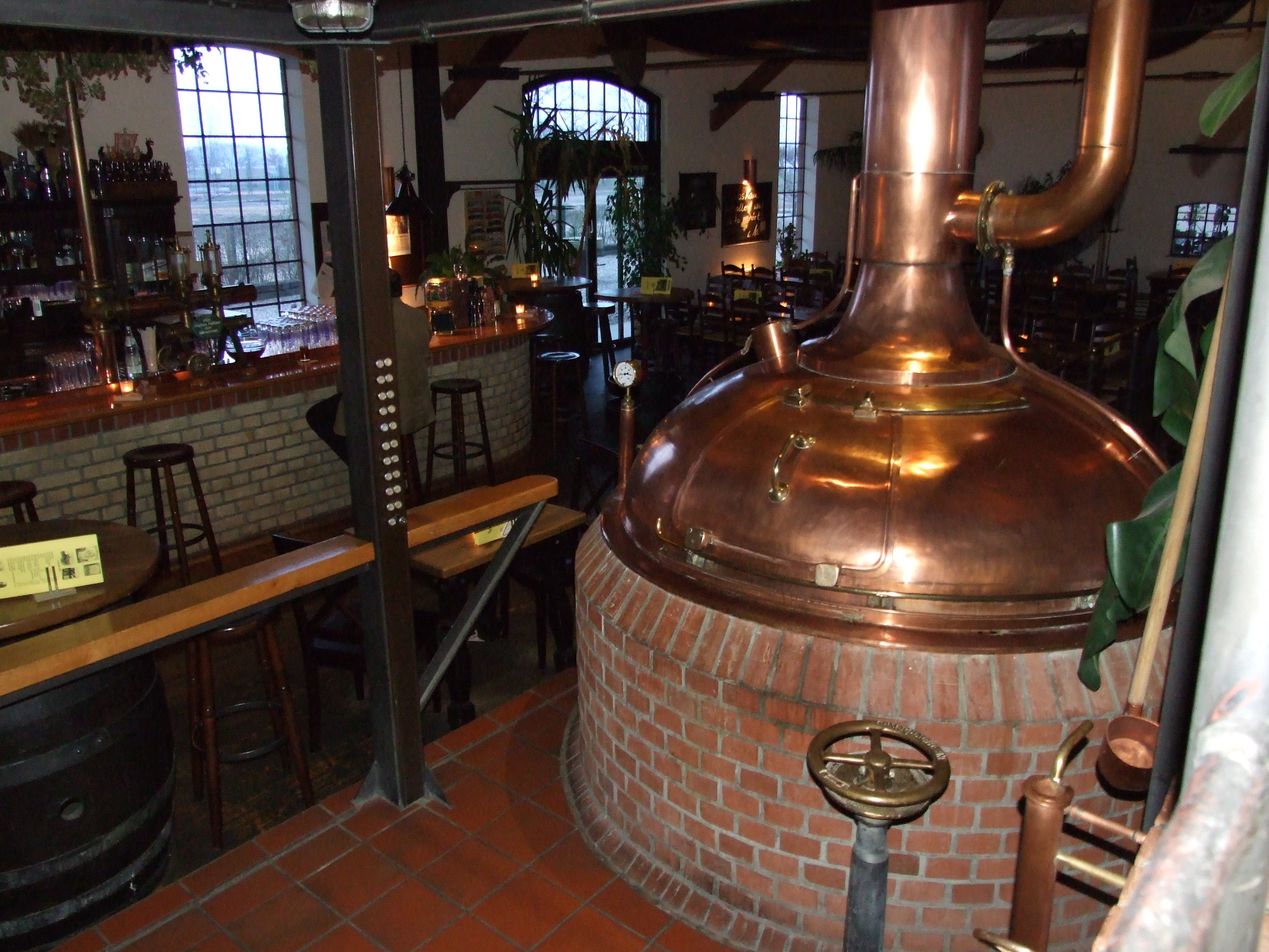 Braukessel und Gaststube der Brauerei Asgaard, Schleswig/Deutschland